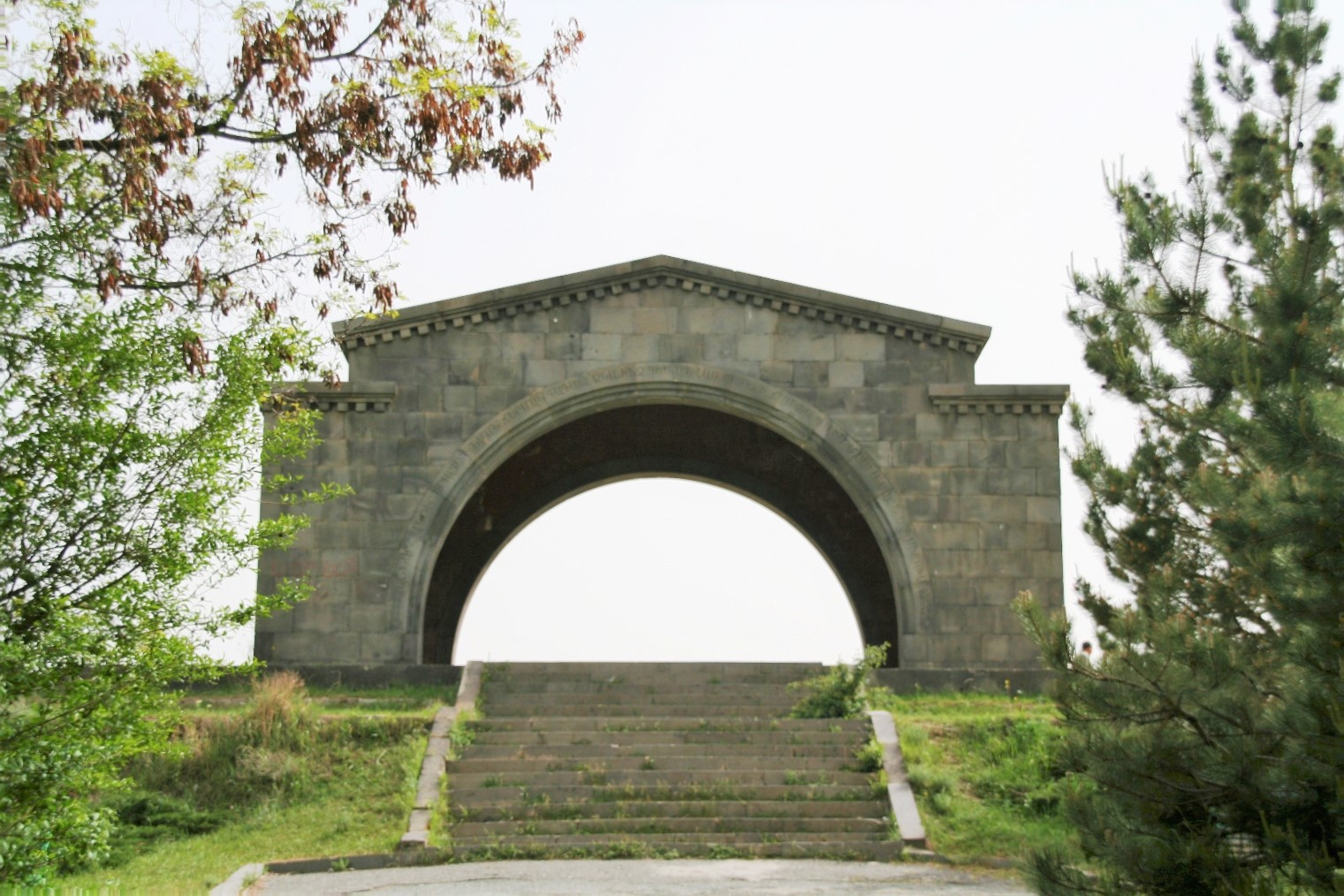 L'arc de Tcharents au nord d'Erevan, Arménie